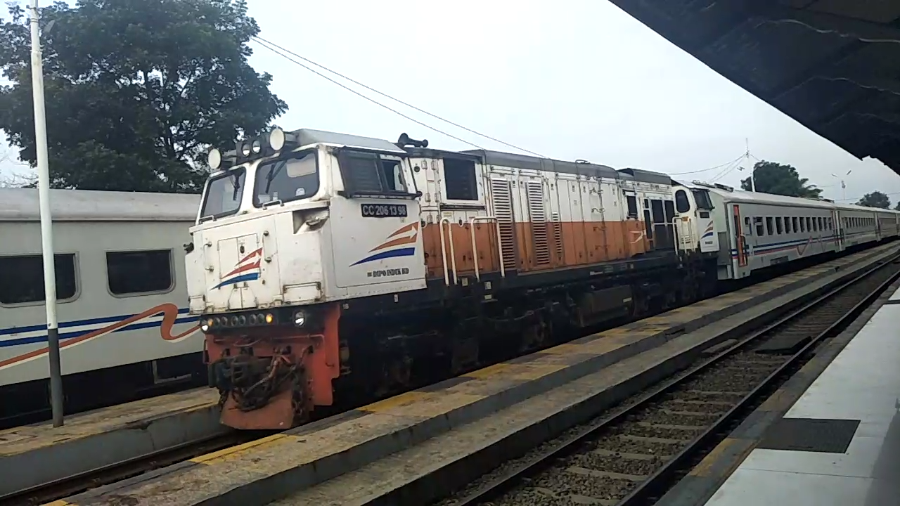 Gambar KA Galunggung yang berhenti di stasiun Cicalengka